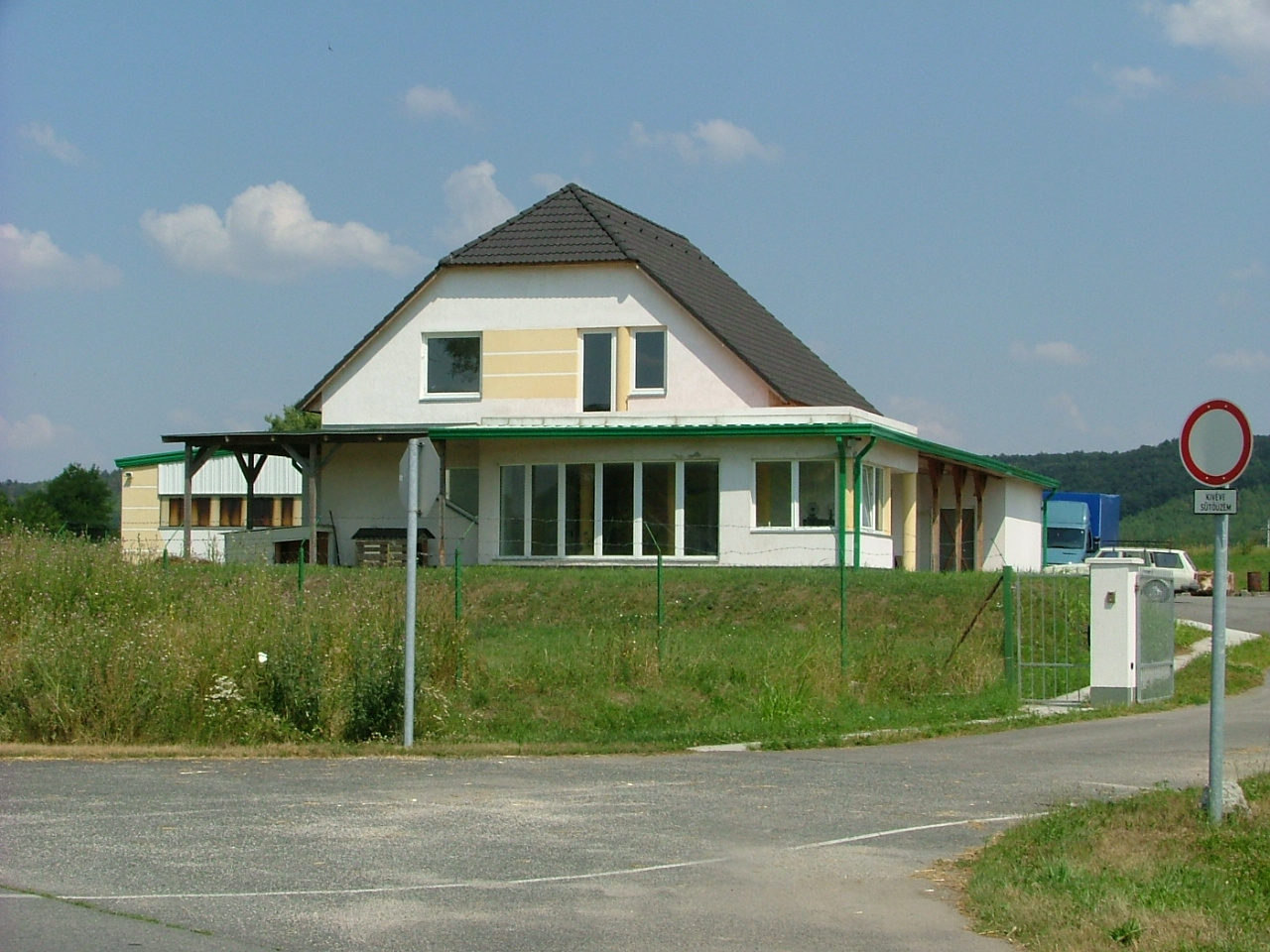 Ravazdi sütőüzem